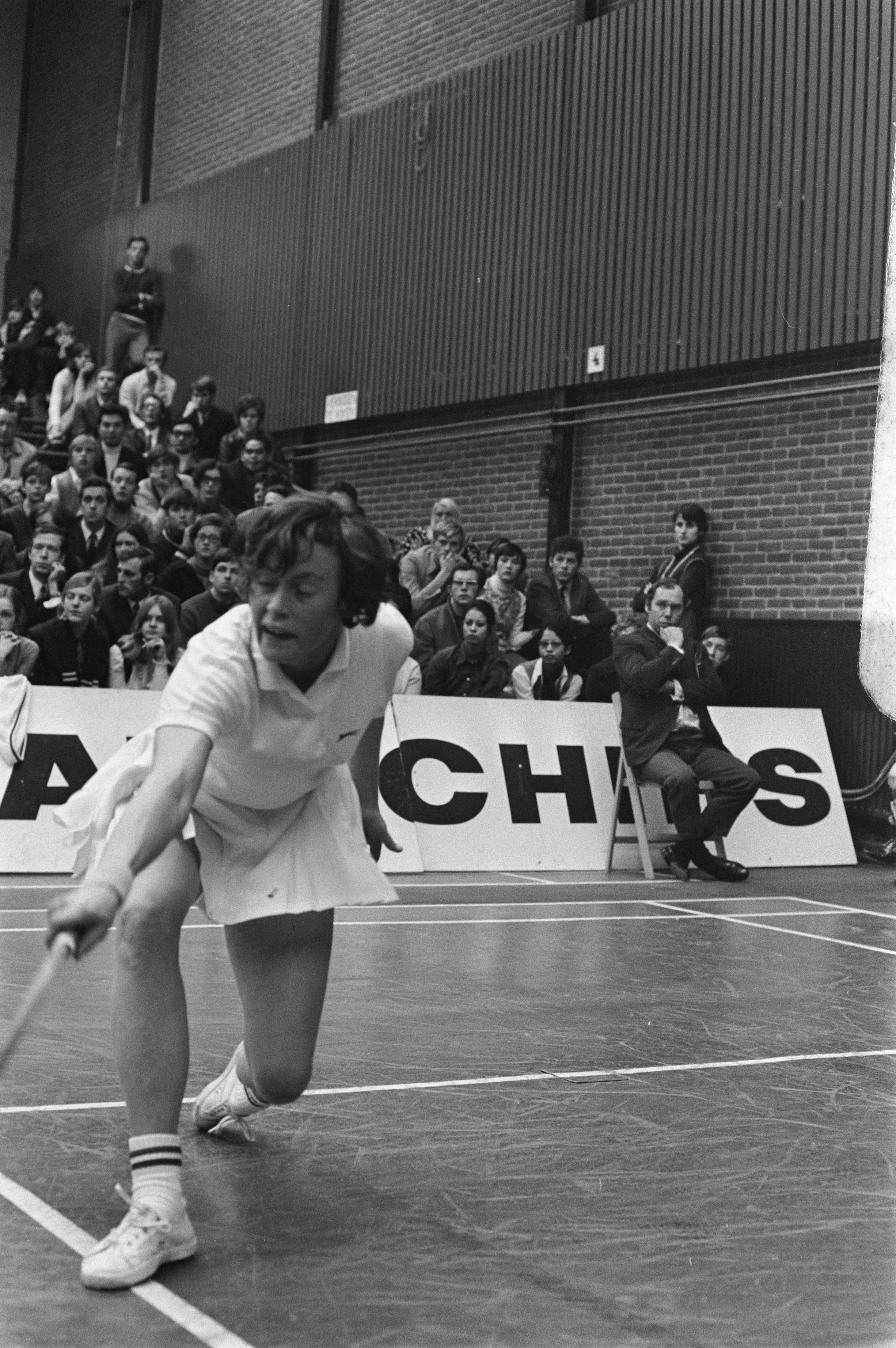 Collectie / Archief : Fotocollectie Anefo Reportage / Serie : [ onbekend ] Beschrijving : Internationale badmintonwedstrijden in Duinwijckhal Haarlem Spelmoment Susan Whetnall Datum : 15 februari 1970 Locatie : Haarlem Trefwoorden : badminton Persoonsnaam : Duinwijckhal Fotograaf : Verhoeff, Bert / Anefo Auteursrechthebbende : Nationaal Archief Materiaalsoort : Negatief (zwart/wit) Nummer archiefinventaris : bekijk toegang 2.24.01.05 Bestanddeelnummer : 923-2558